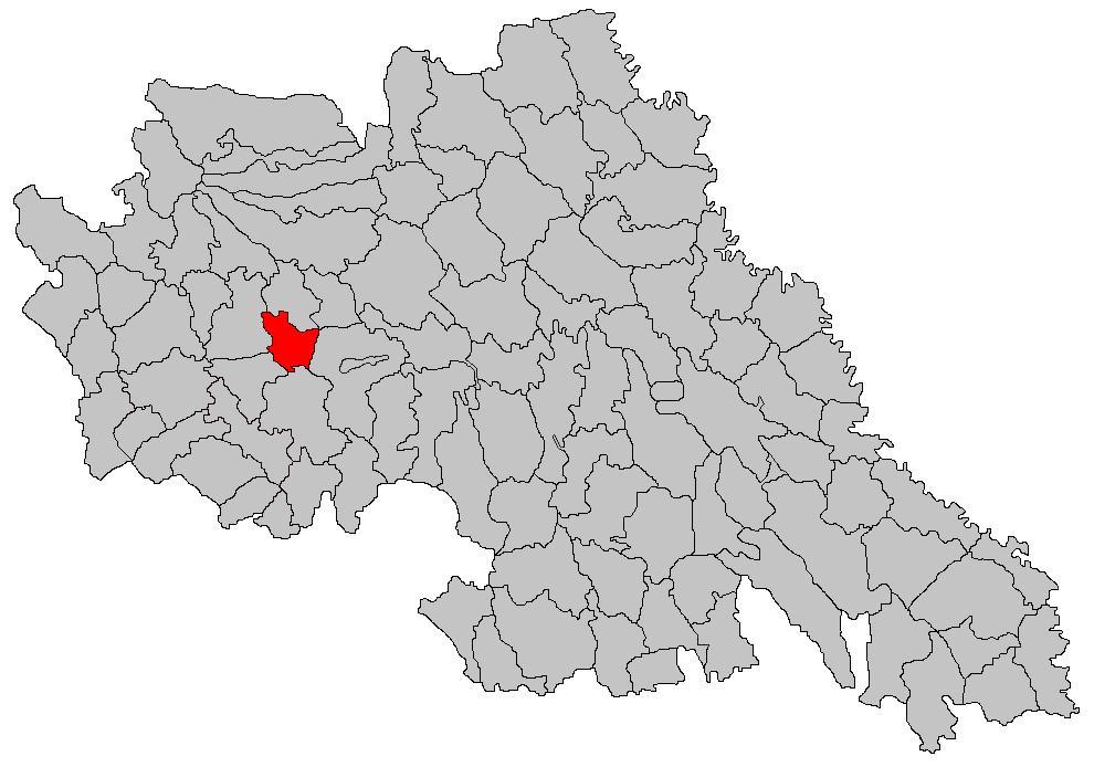 Categorie:Hărţi ale judeţului Iaşi